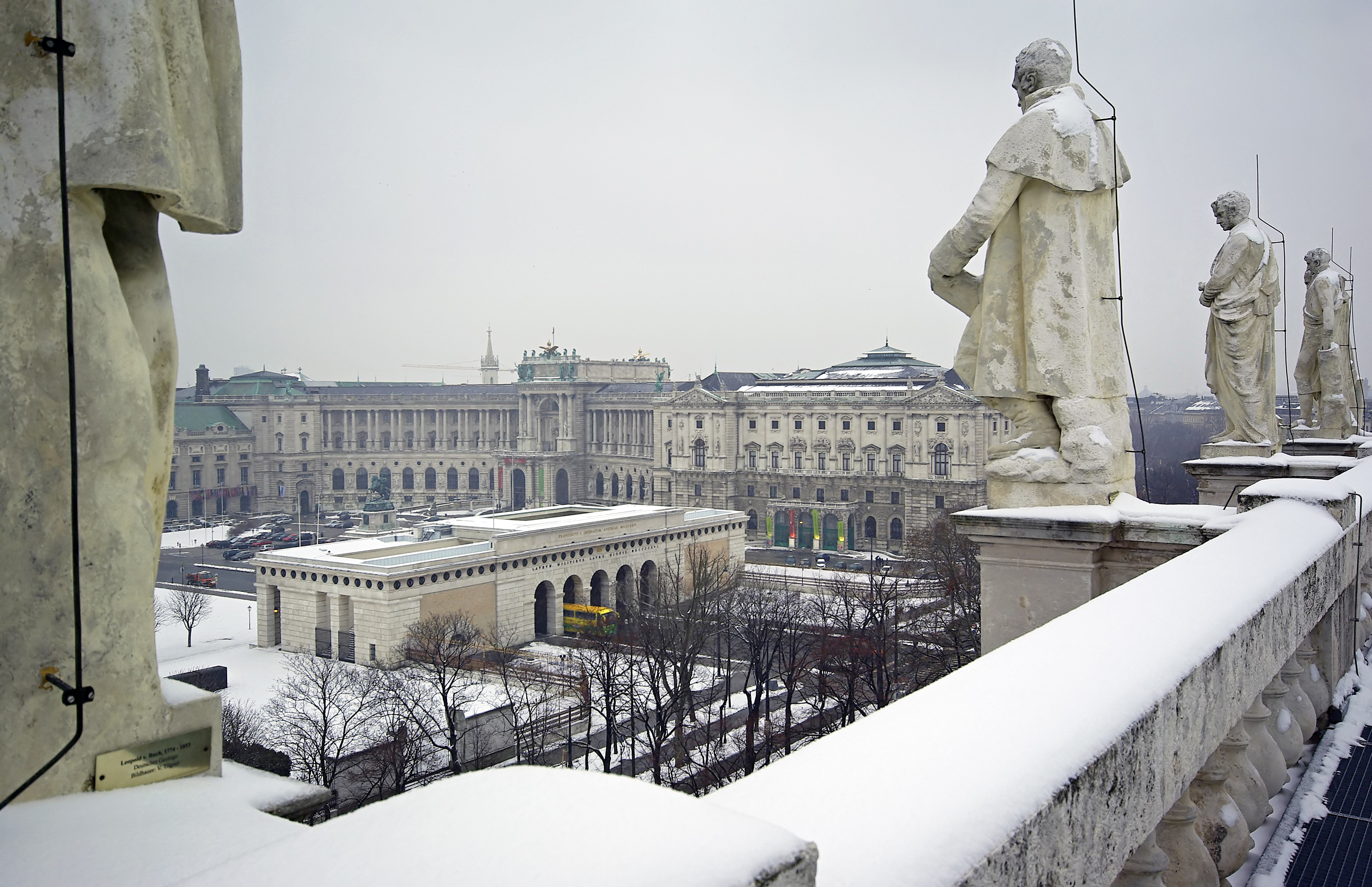 Blick vom Dach des Naturhistorischen Museums über das Äußere Burgtor zur Neuen Burg, die im östlichen Flügel das Haus der Geschichte Österreich (HGÖ) beherbergen wird. Auch das Äußere Burgtor wird ein Element des HGÖ.